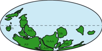 nog groter Panotia NASA/bewerkt